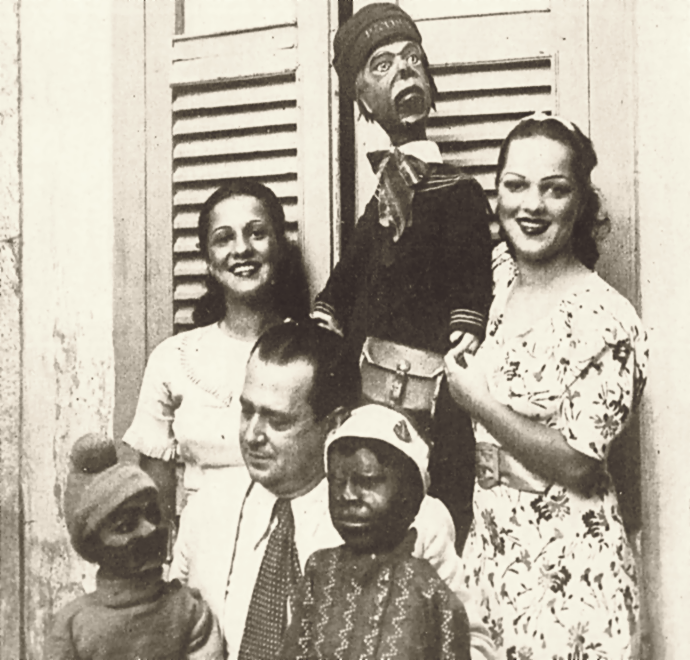 O ventríloquo brasileiro Batista Júnior com seus bonecos e as duas filhas Linda e Dircinha Batista, em 1937.